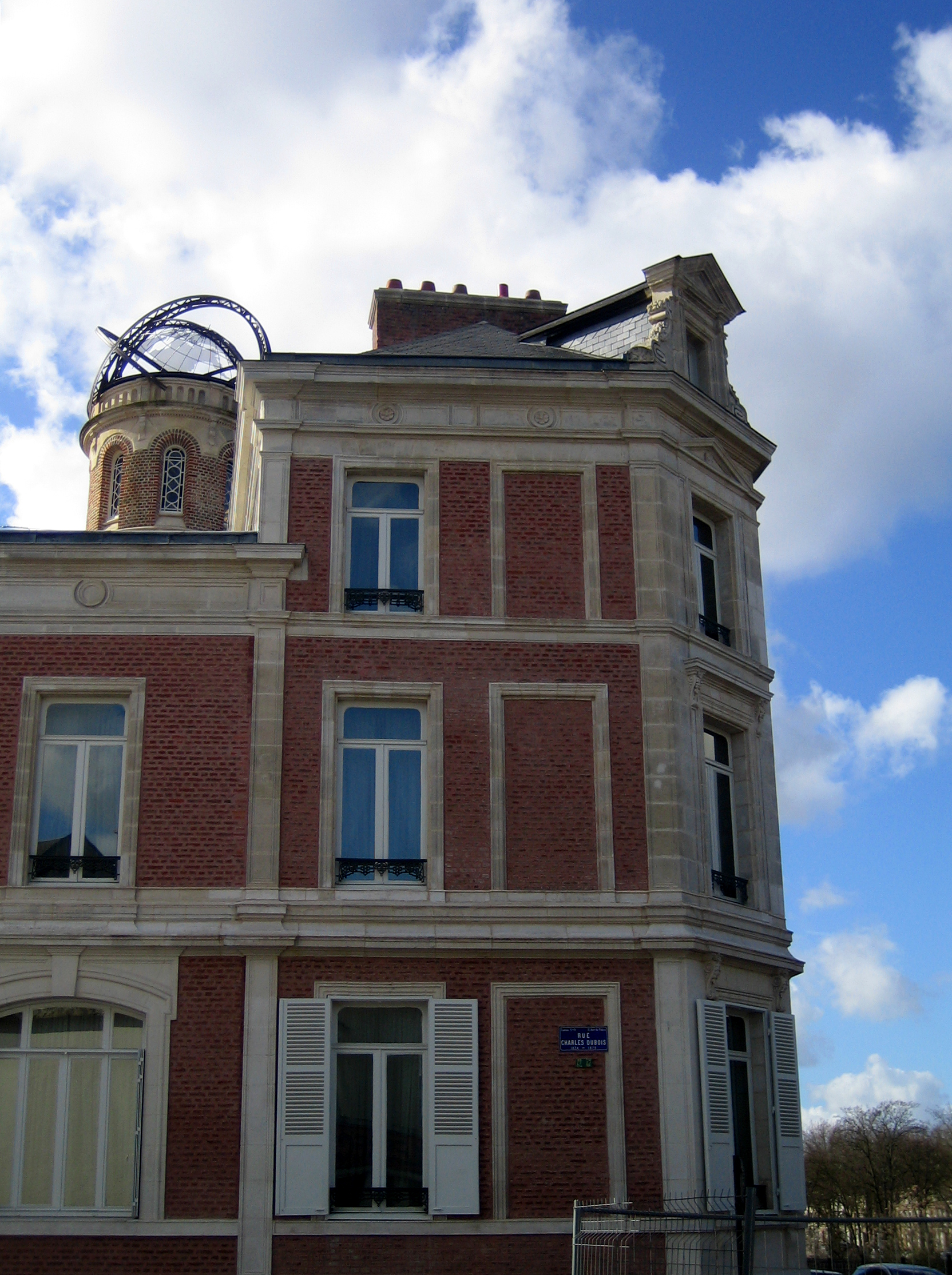 Amiens (Somme, France) - La Maison de Jules Verne (repérable à sa tour) fait angle entre la rue Charles Dubois et le Boulevard Jules Verne qui est parallèle au Mail Albert 1er. .